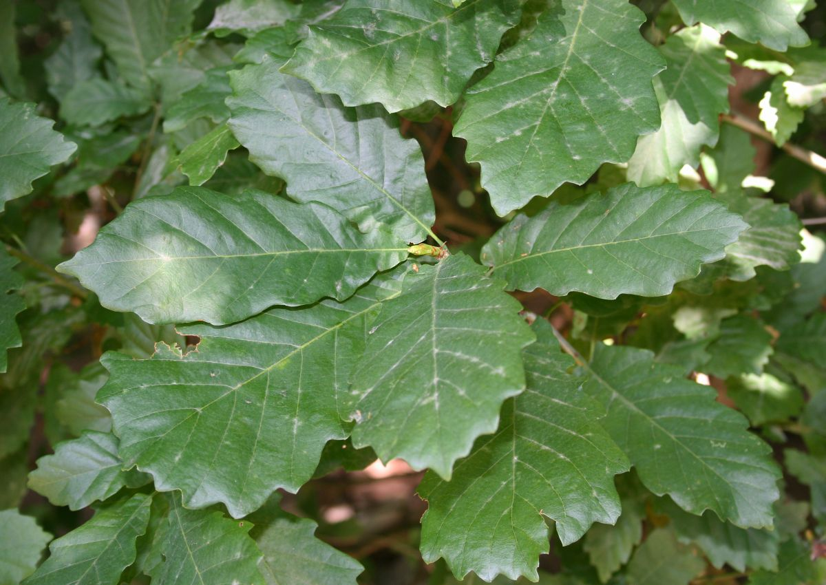 Quercus hartwissiana, Buchengewächse (Fagaceae) - Türkei/Türkiye/Turkey: Sakarya Prov./Sakarya ili, Sinanoğlu SW Karasu